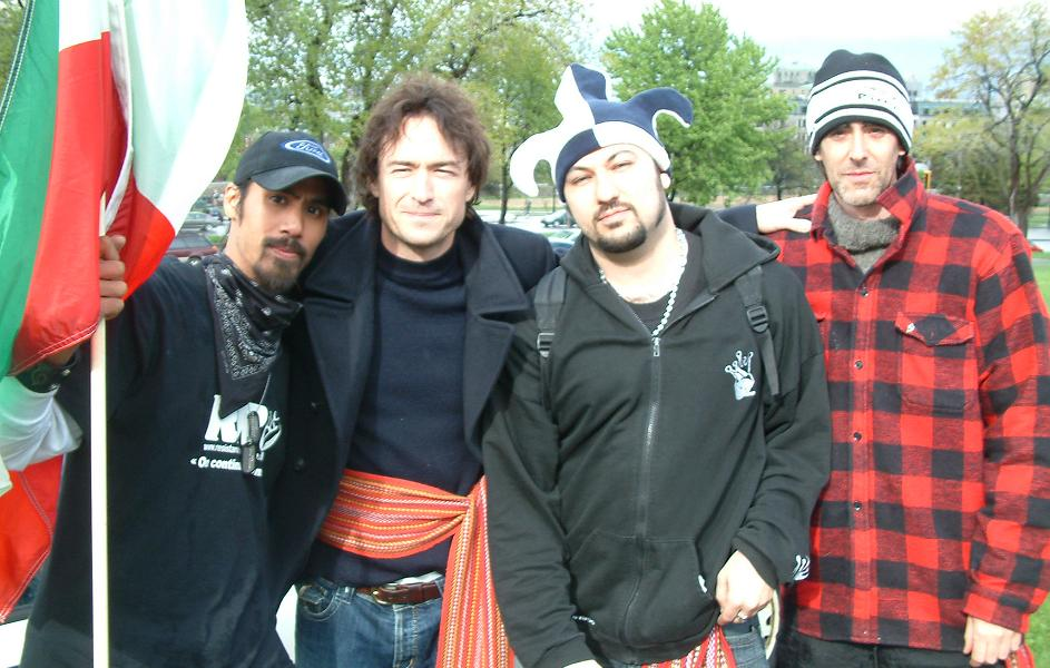 La Journée Nationale des Patriotes 2008 à Montréal, le groupe Rap Loco Locass avec un Membre du Réseau de Résistance du Québécois.